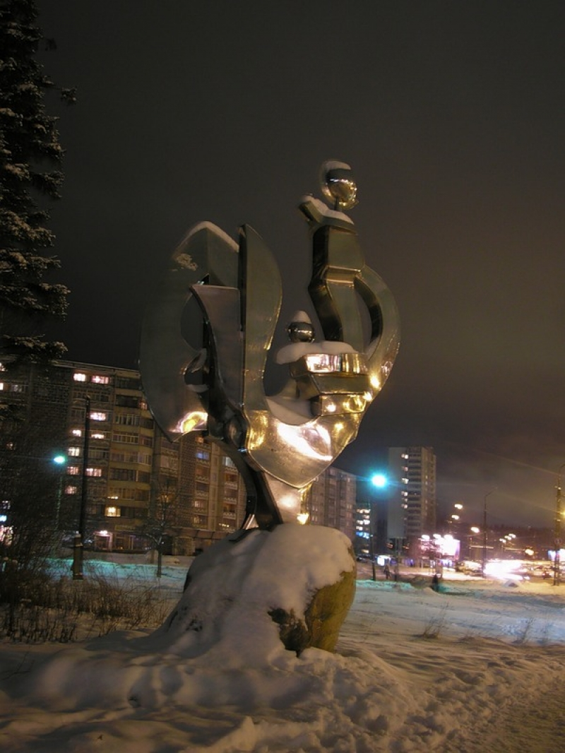 Скульптура Петуха в Петрозаводске (металл). Россия, Республика Карелия. Скульптор В. Сойни. Установлена 30 сентября 1988 года.